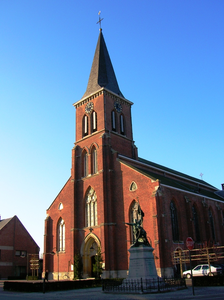 Foto zelf genomen op 29 november 2006.